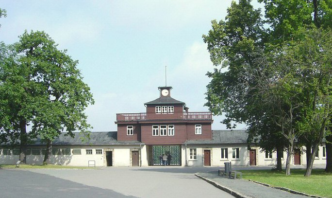 Buchenwald, toegangspoort tot het strafkamp. Eigen foto Mark Voorendt, augustus 2004